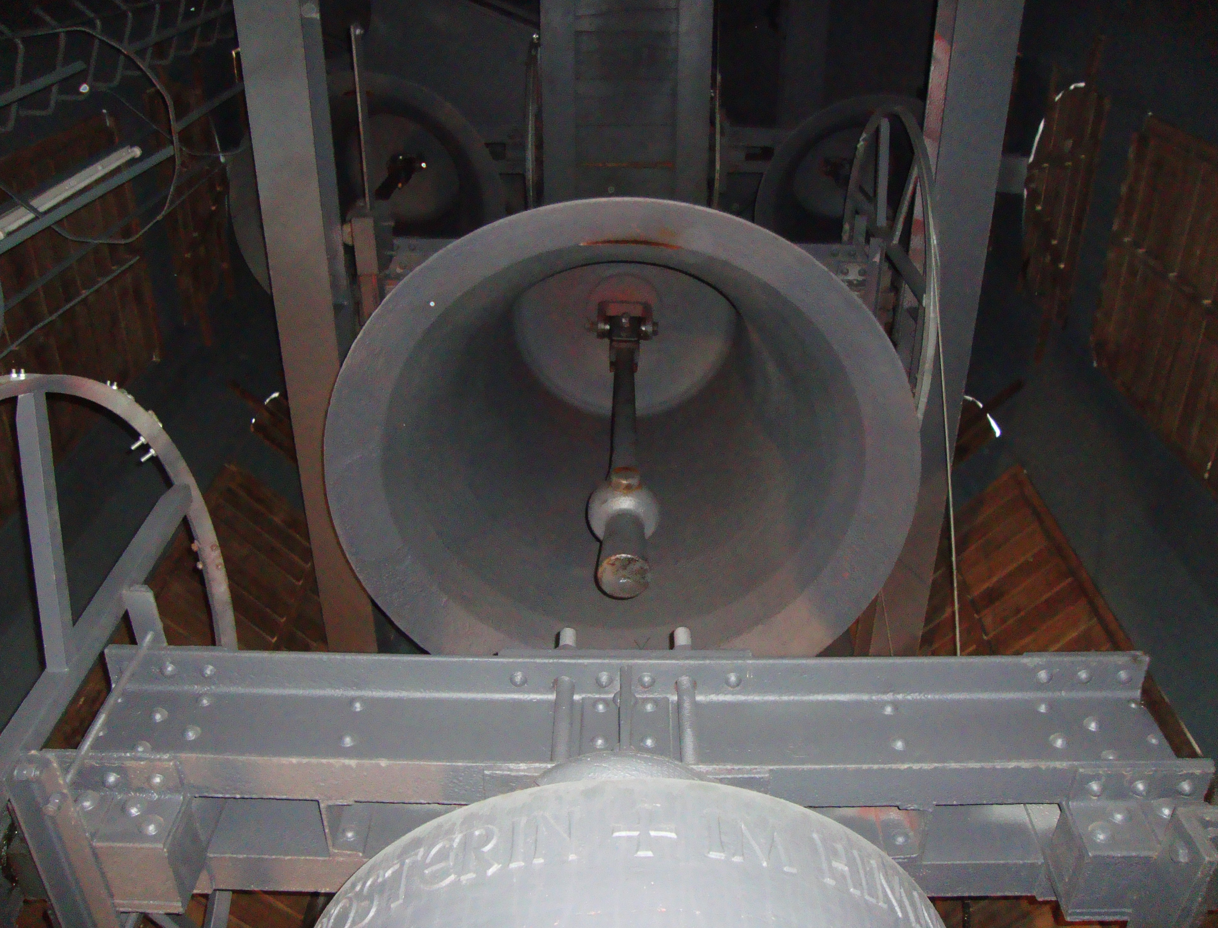 Glocken der Propsteikirche St. Johannes Baptist in Dortmund